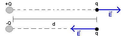 Campo eletrico